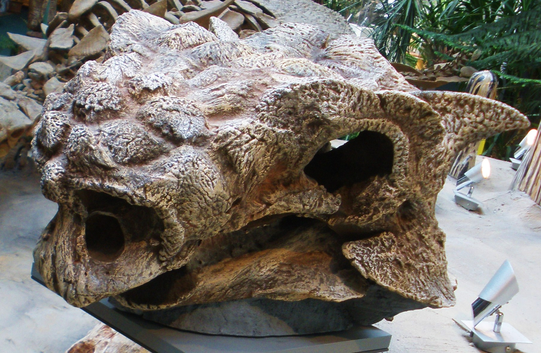 fossil Saichania